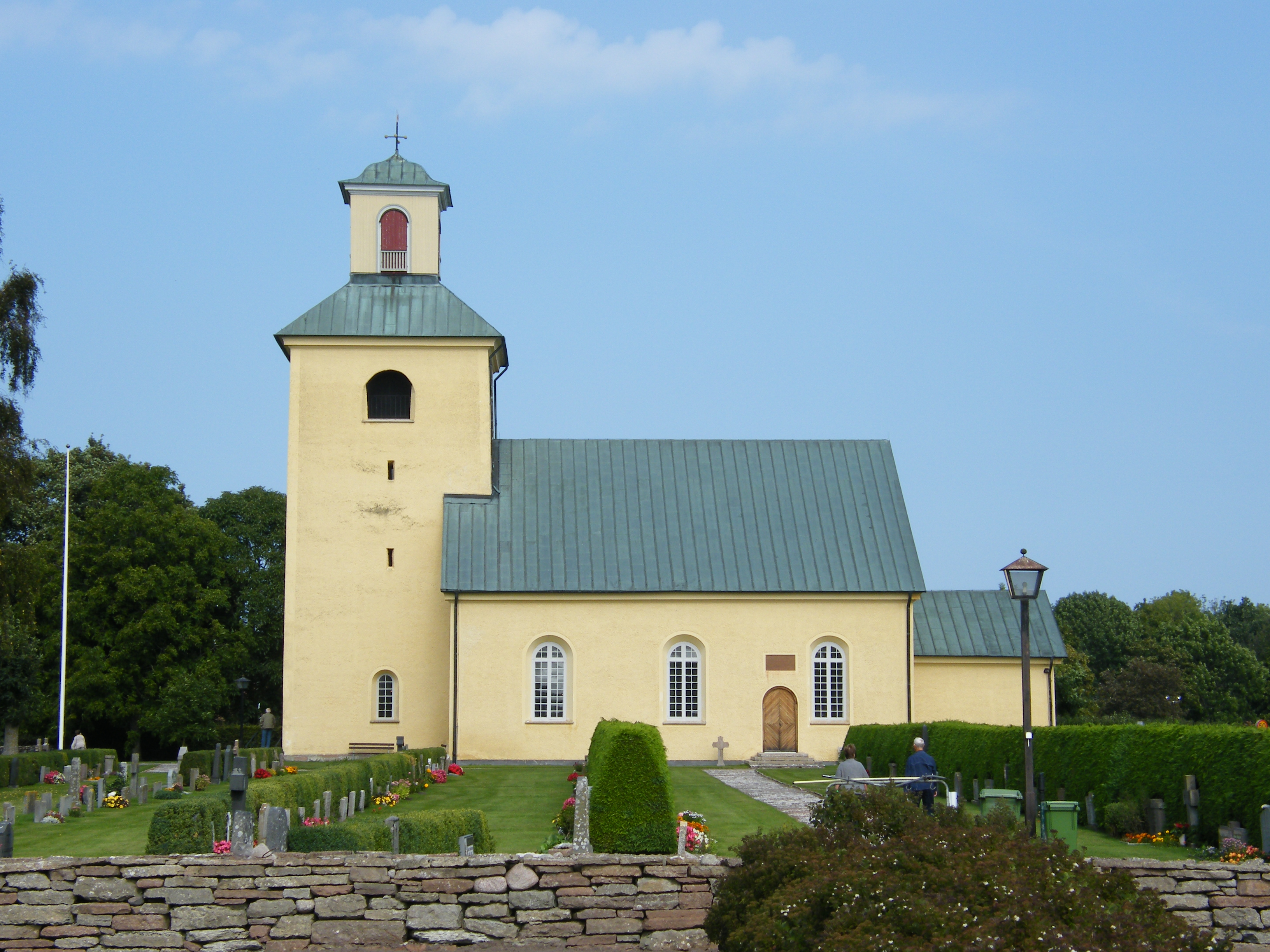 Böda kyrka